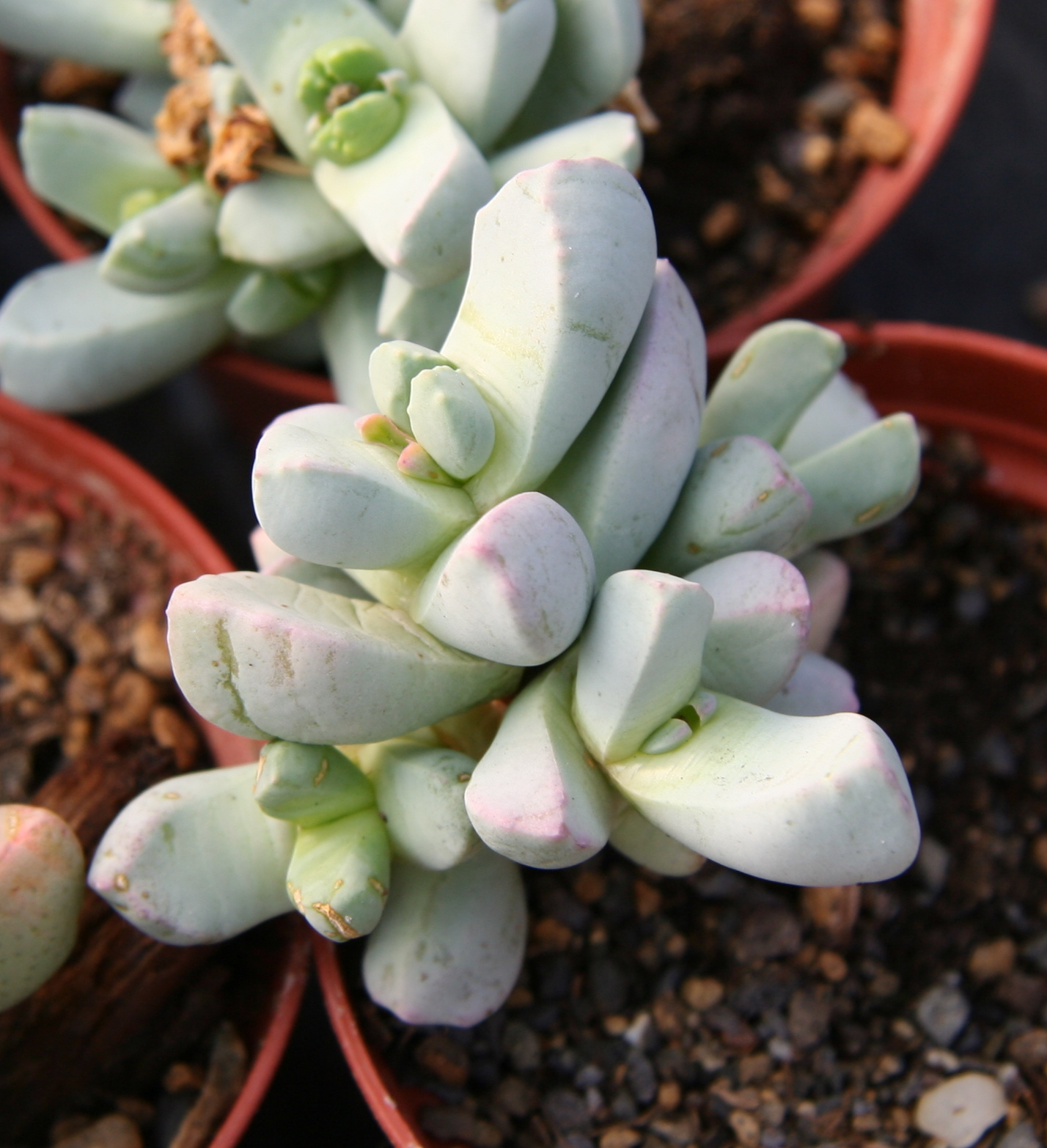 Dracophilus dealbatus SB796 in Kultur bei Kakteen-Haage in Erfurt